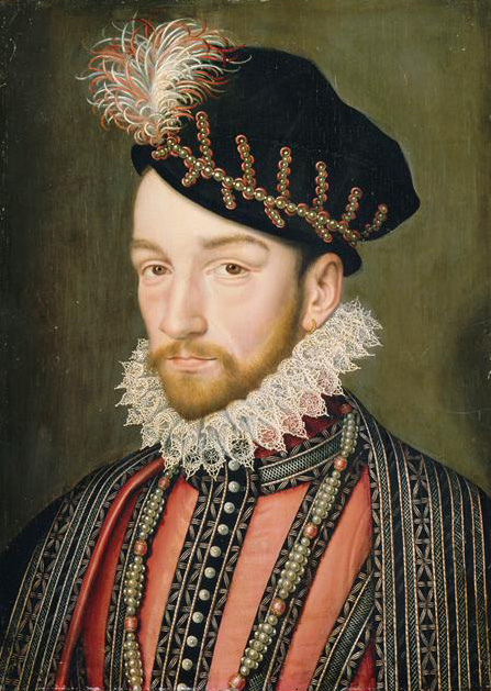 Portrait of Charles IX of France (1550-1574)label QS:Len,"Portrait of Charles IX of France (1550-1574)" label QS:Lde,"Porträt Karls IX. von Frankreich" label QS:Lfr,"Portrait de Charles IX de France"